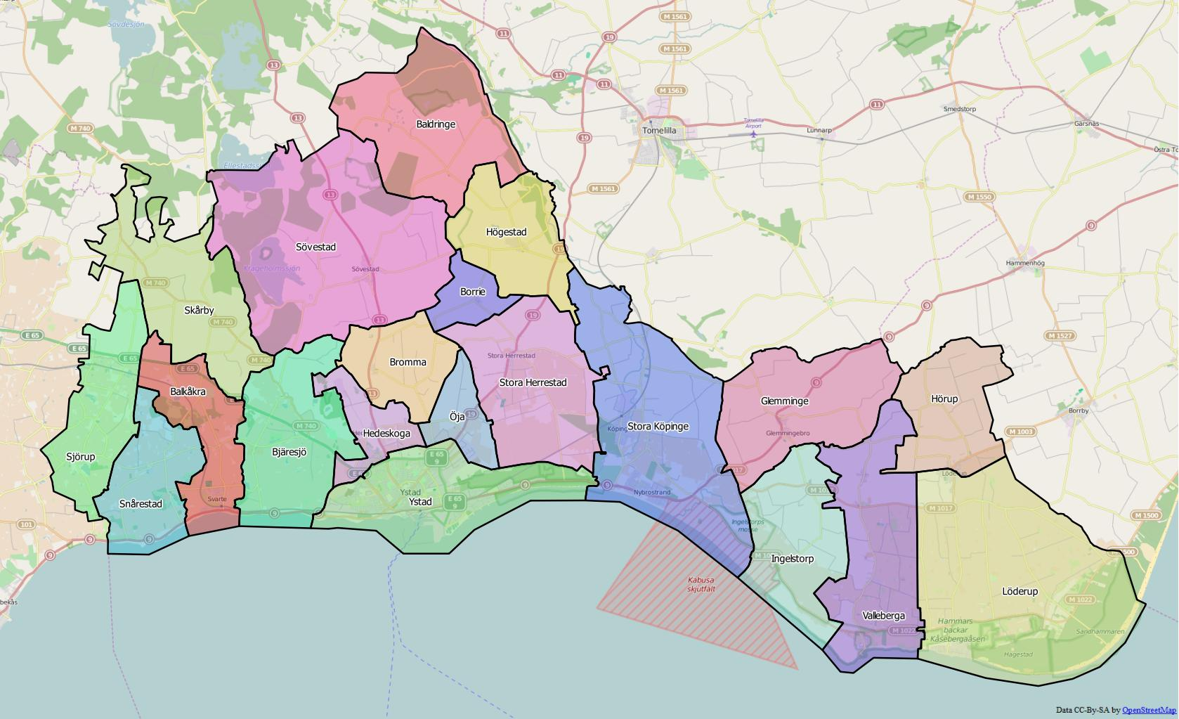 Distriktsindelningen i Ystads kommun World file 42.29501836961964045 0 0 -42.29501836961964045 1513700.97543407022021711 7475946.46652781777083874